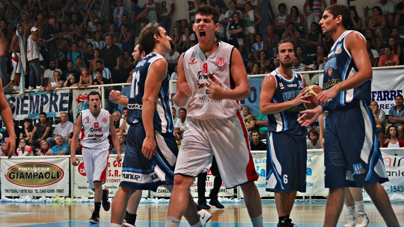 CLASICO DE BASQUET DEL TORNEO FEDERAL, CON TRIUNFO DEL ROJO 85 A 81 DE VISITANTE. FEB. 2013